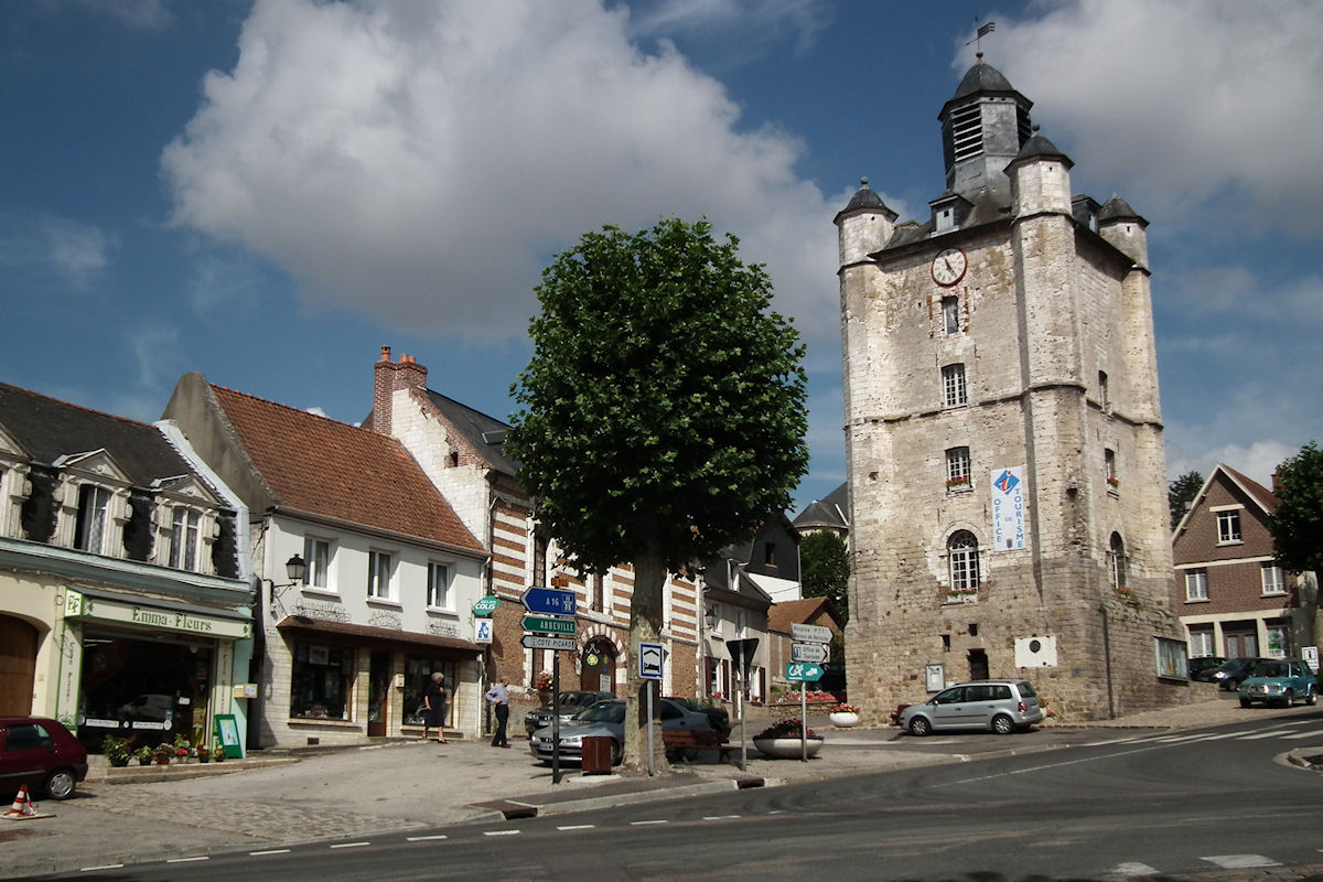 Le beffroi de Saint-Riquier, Saint-Riquier, Somme, Picardie, France